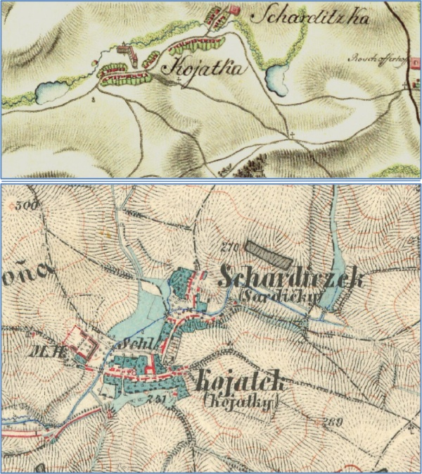 I. a III. vojenské mapování